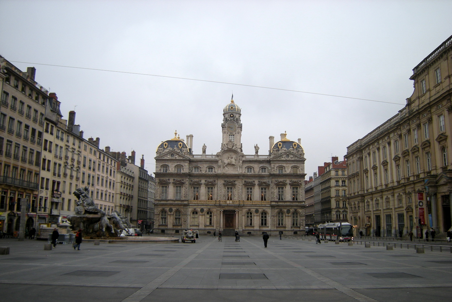 Ao fundo, o Hotel de Ville. Lyon